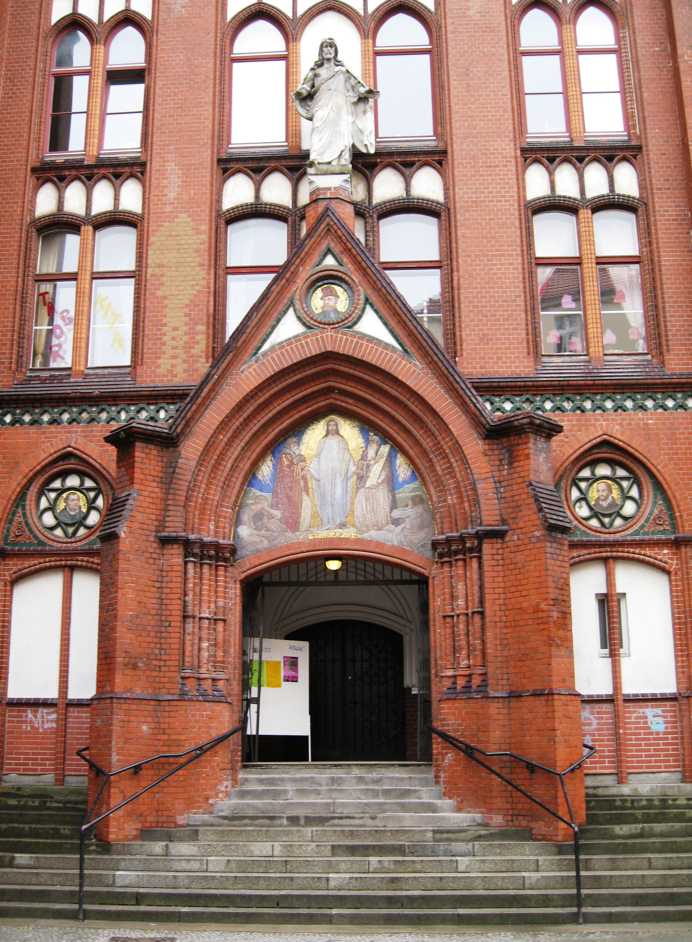 Haupteingang der Taborkirche